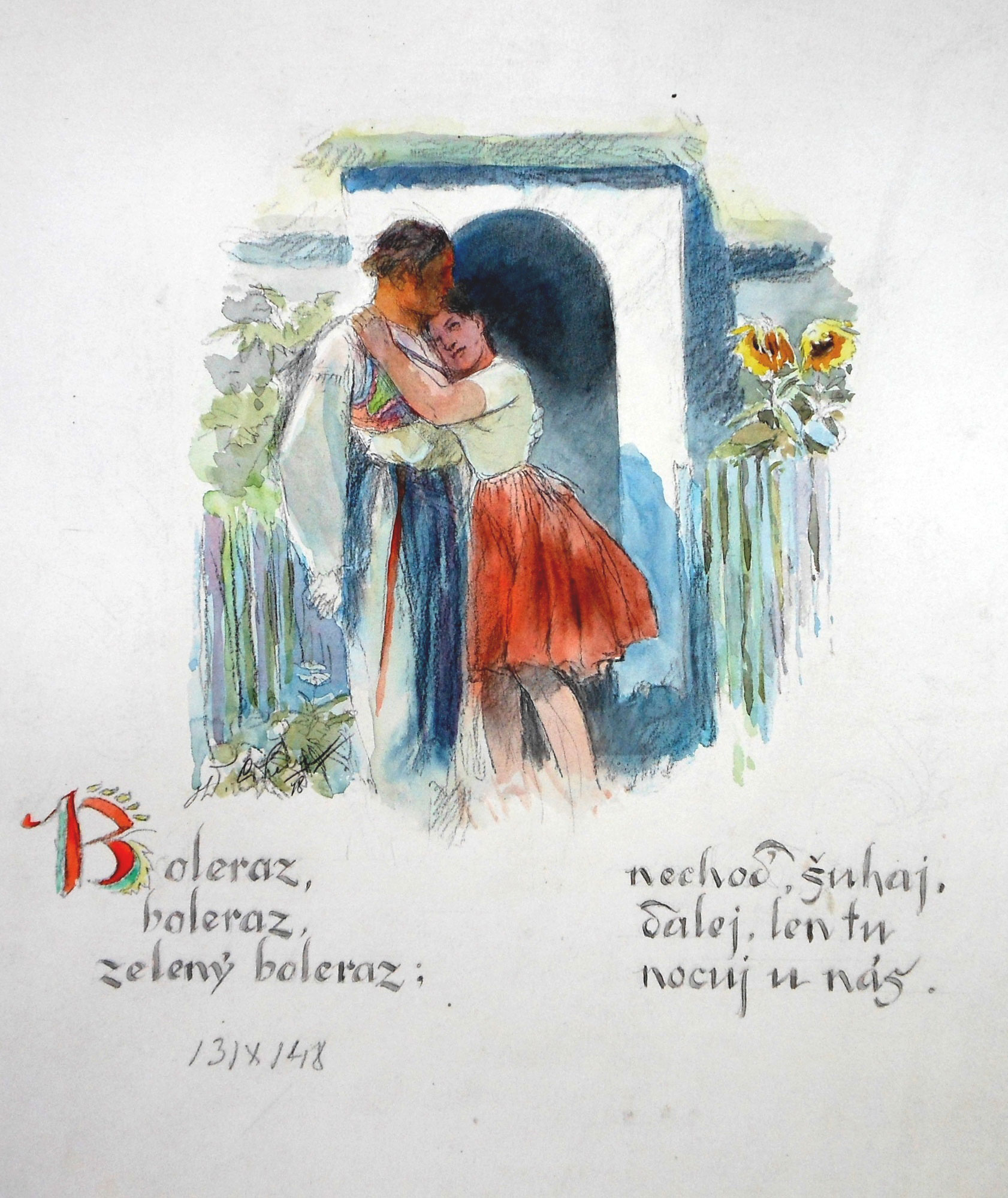 Oldřich Cihelka: Boleraz. Akvarel. 1948.